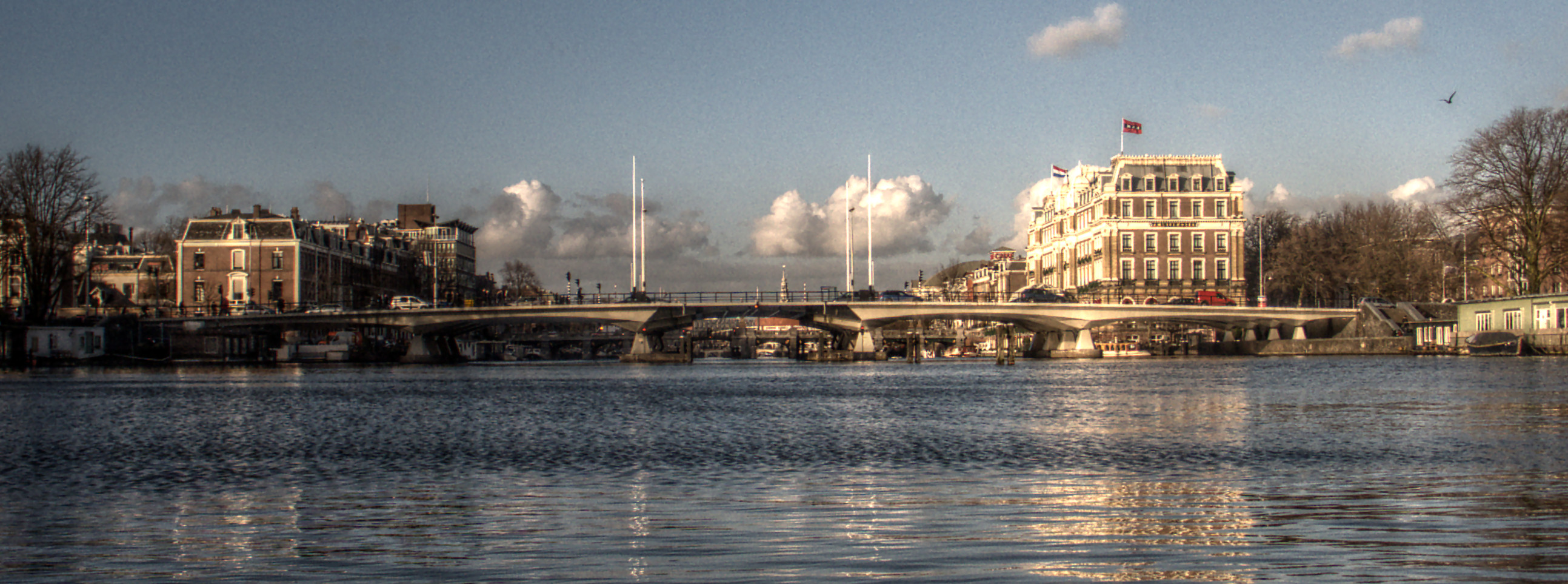 De Torontobrug te Amsterdam, gezien naar het Noorden